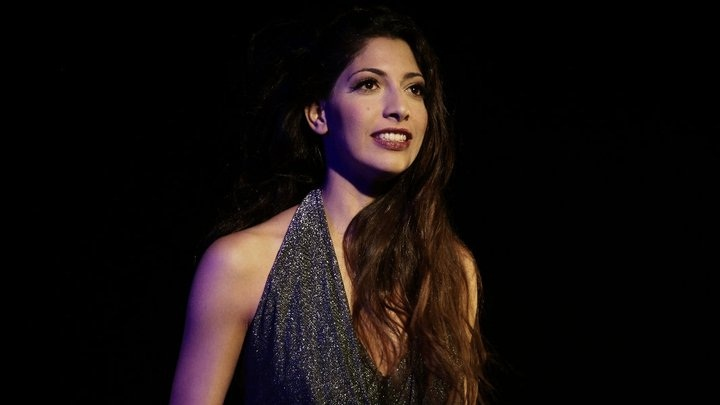 פונדק הרוחות-הפונדקית